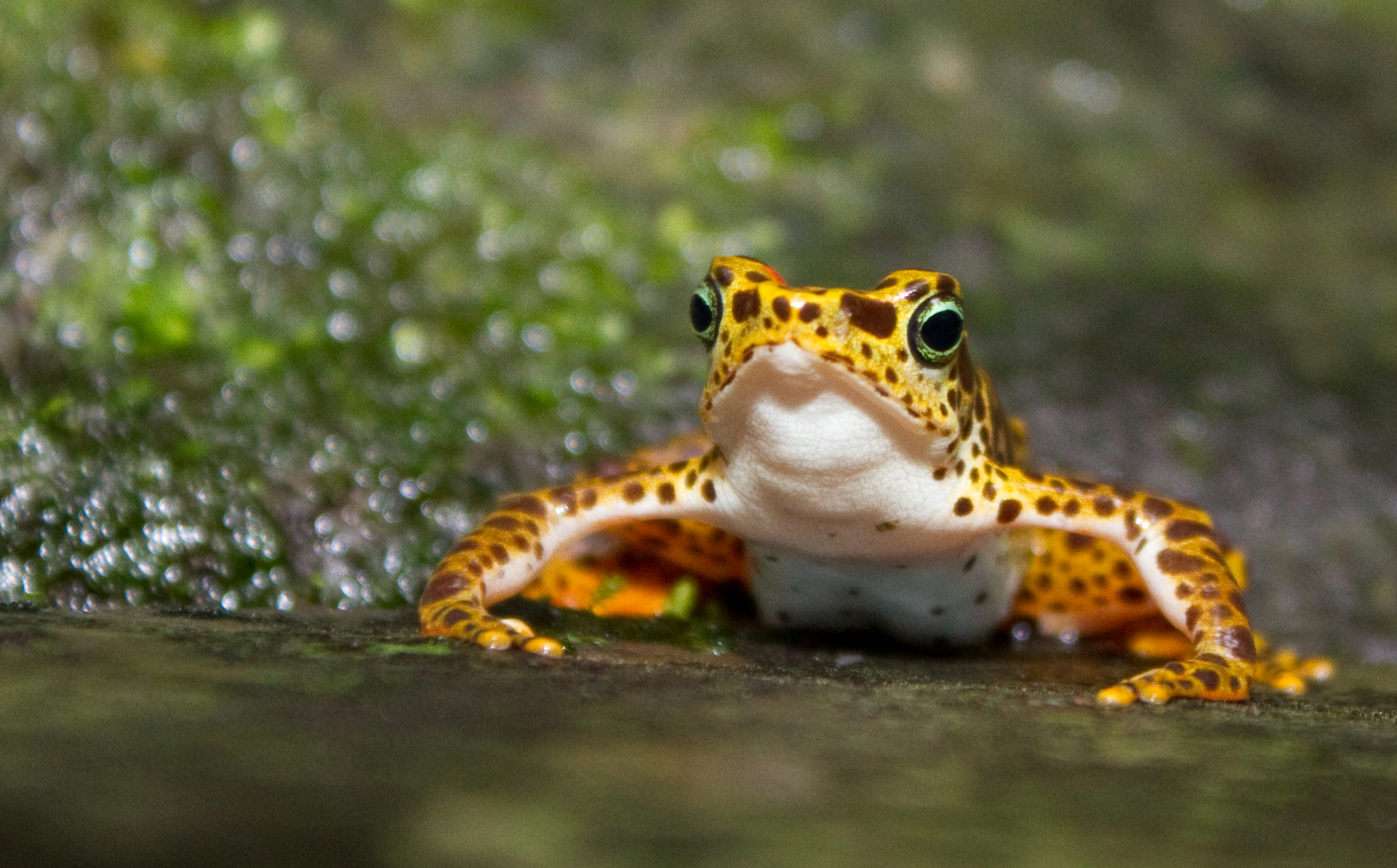 Atelopus certus